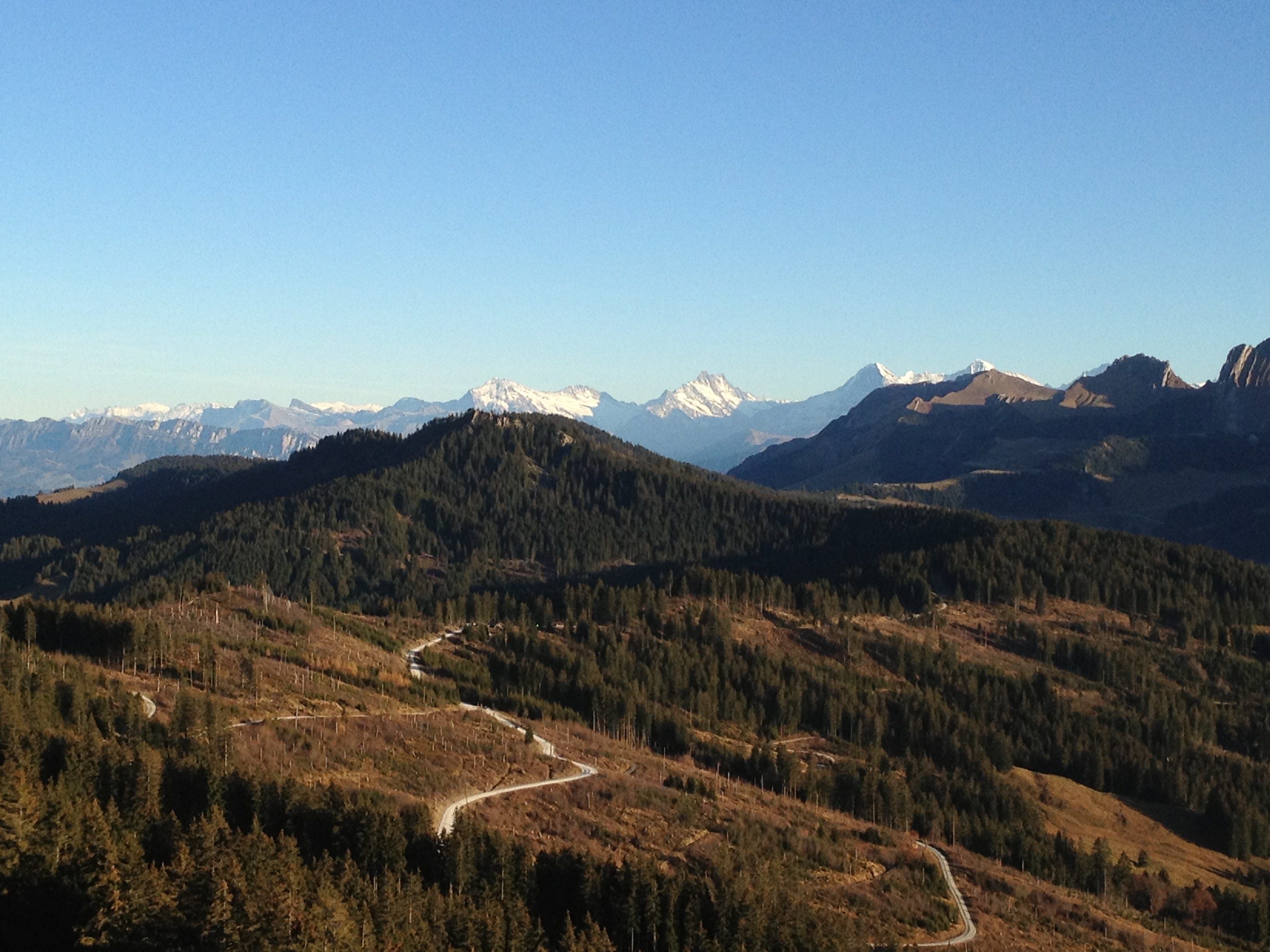 Blick von der Pfiffe Richtung Südosten; Gipfel des Berner Oberlands